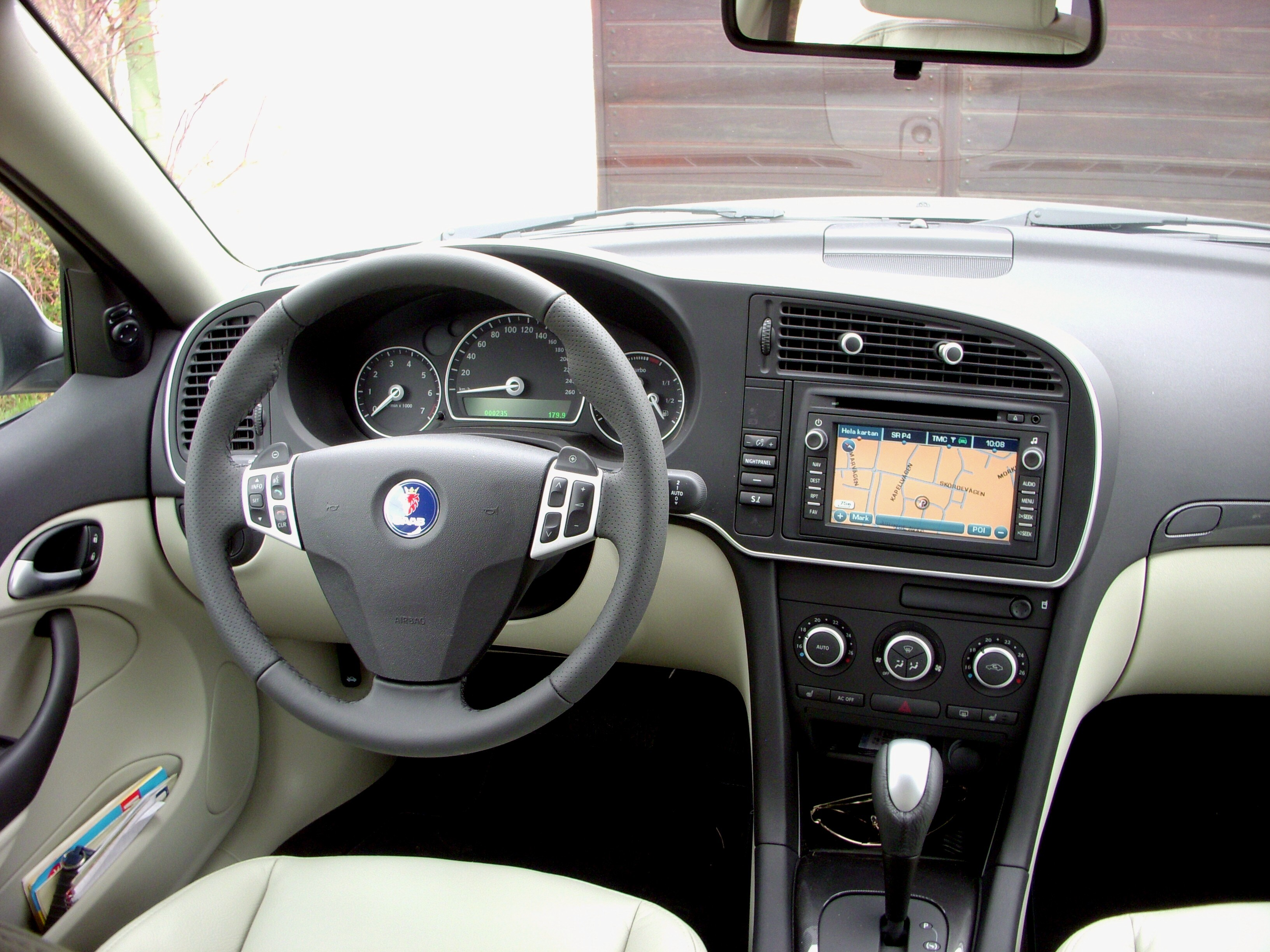 SAAB 9-3X, förrarplats